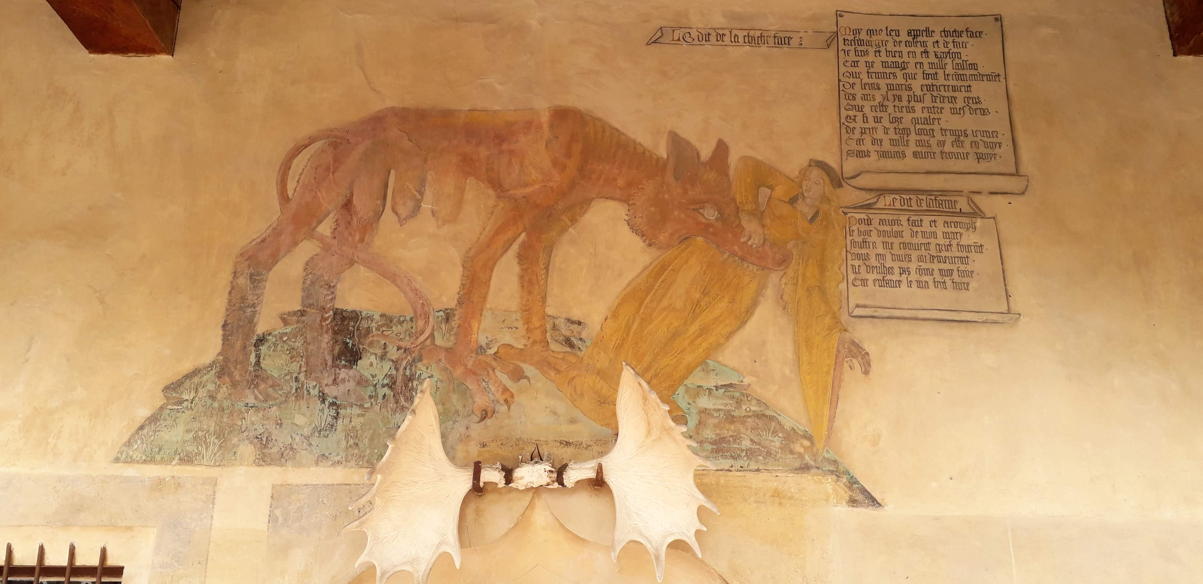 "Le dit de la Chicheface", peinture murale du château de Villeneuve-Lembron (Puy-de-Dôme), XVIe siècle